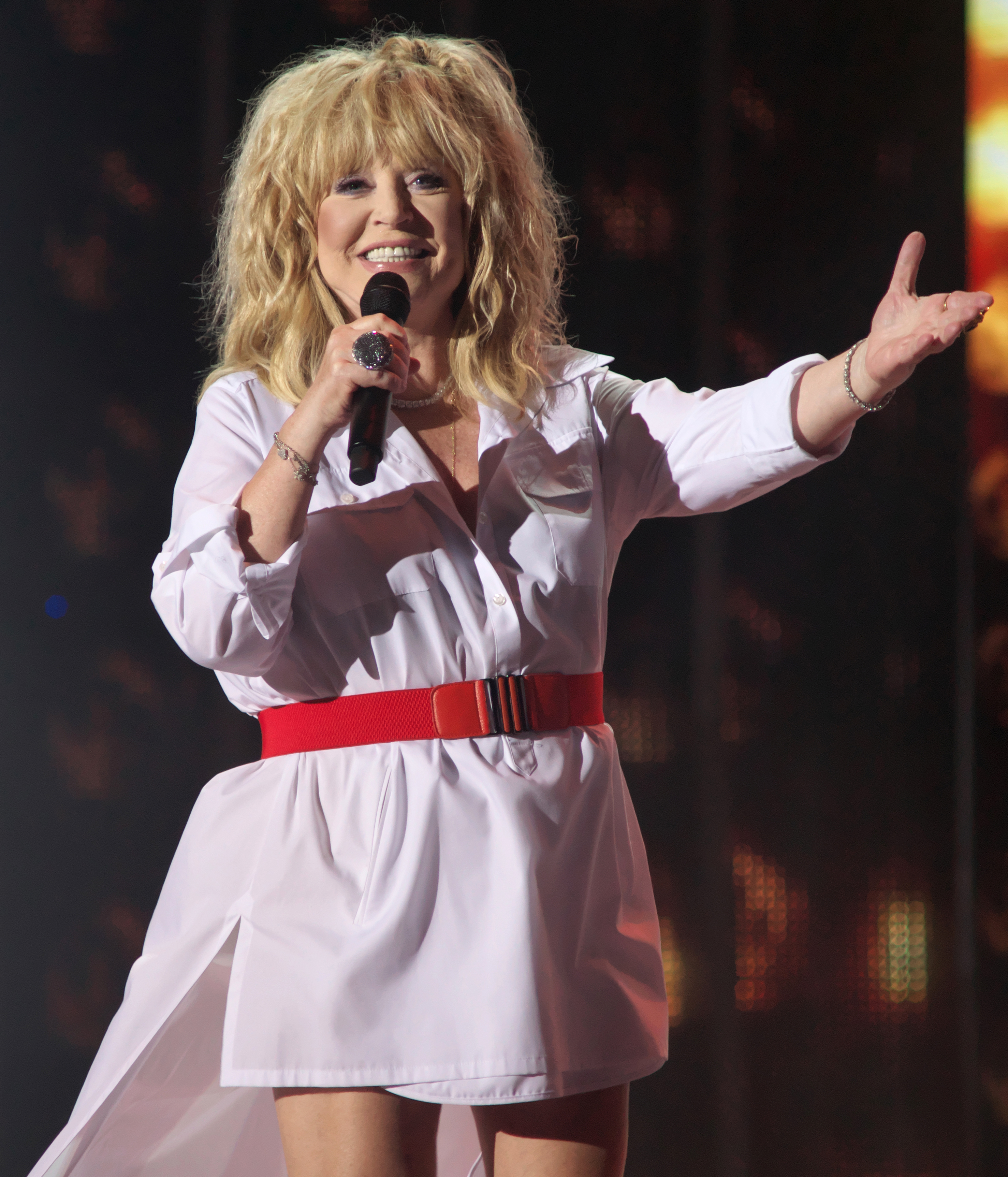 Алла Пугачева на Славянском базаре в Витебске, 2016 год